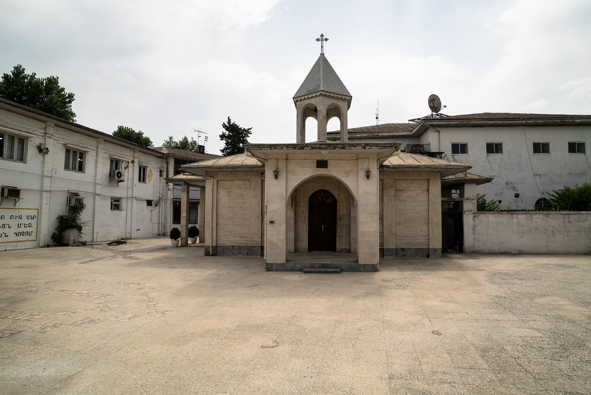 saint marry church bandar anzali